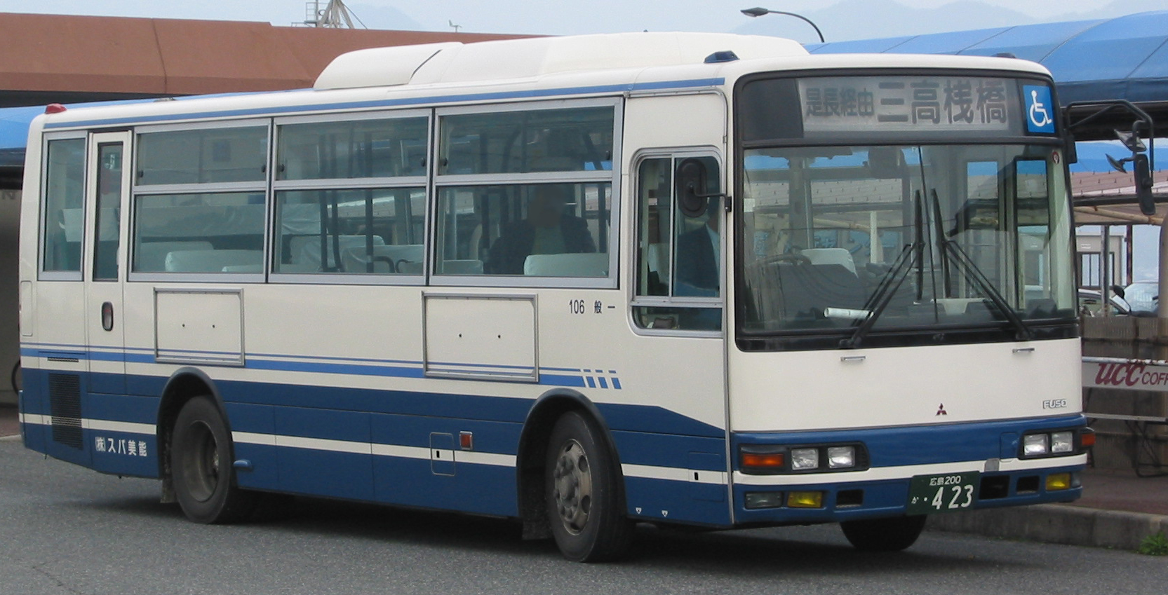 能美バス（広島県） 路線バスの車両